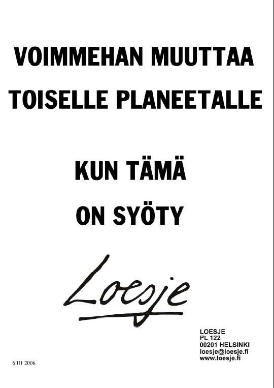 Finnish Loesje poster